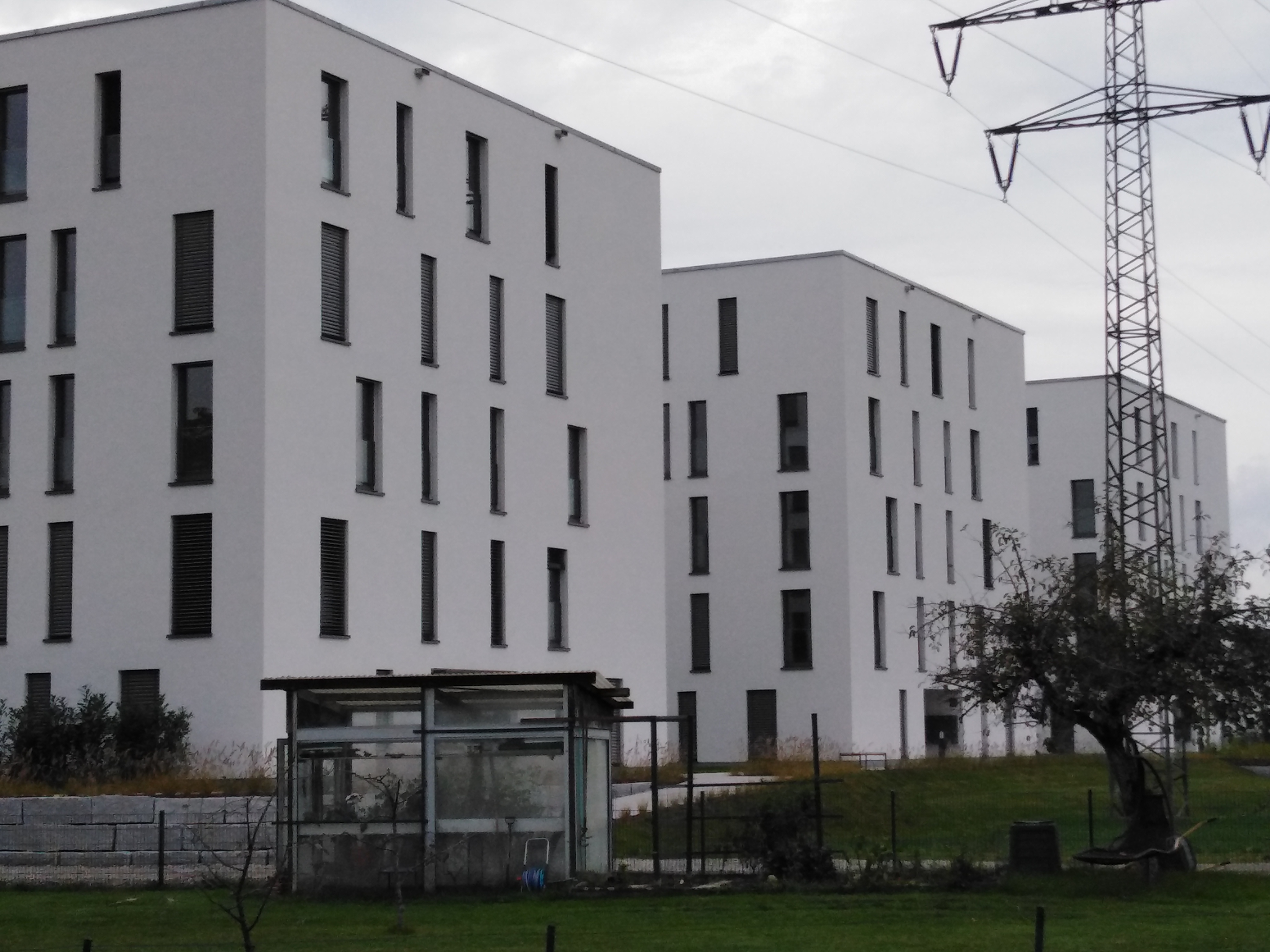 Ortschaft Kadelburg, Ortsteil der Gemeinde Küssaberg im Landkreis Waldshut in Baden-Württemberg. Neubaublöcke im Gewann Neunschwanz (Name ist abgeleitet von „Mäuseschwanz“)